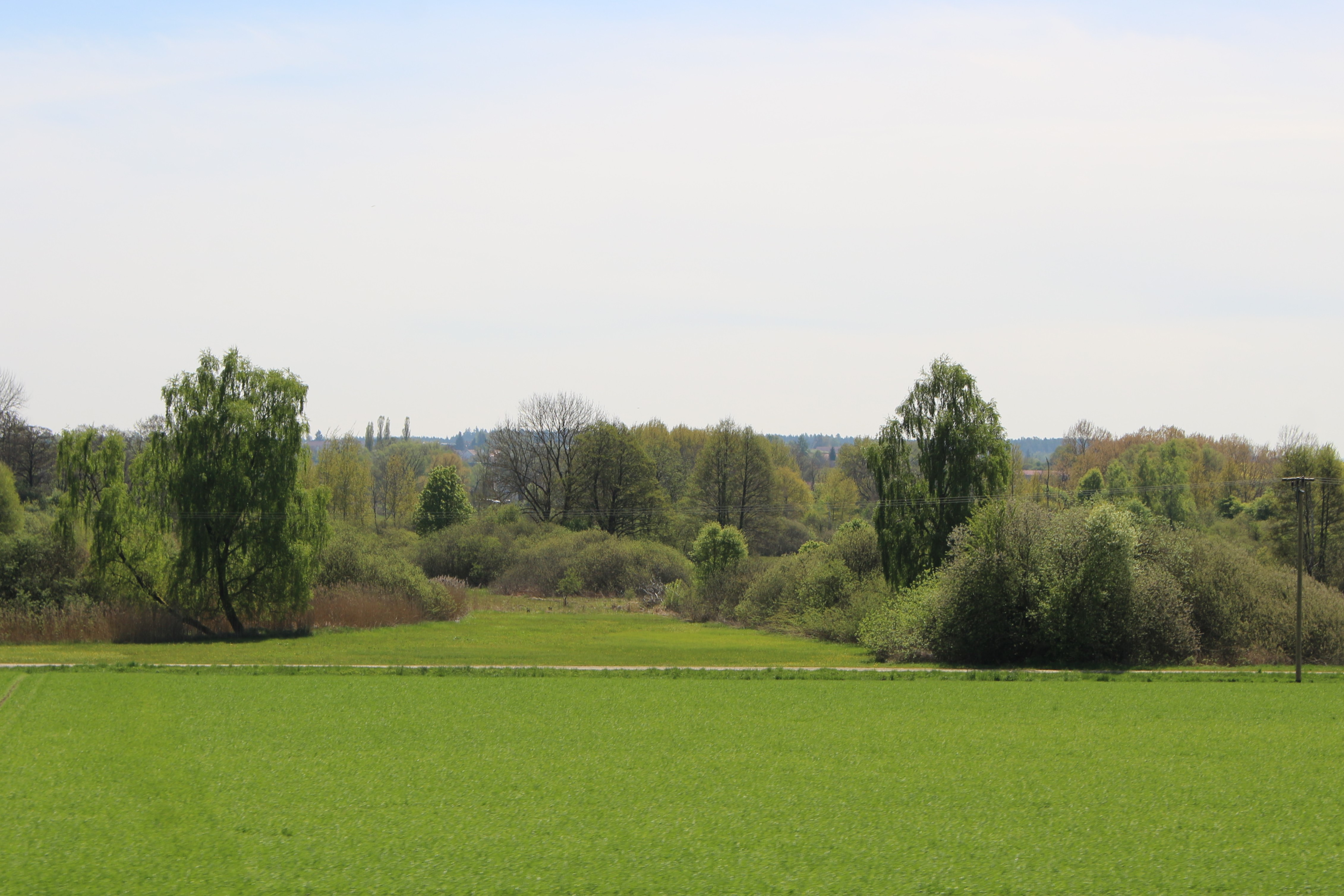 Teilansicht des Weichser Moos von der nördlichen Seite entlang der Landstrasse (ST 2054) zwischen Weichs und Ebersbach.